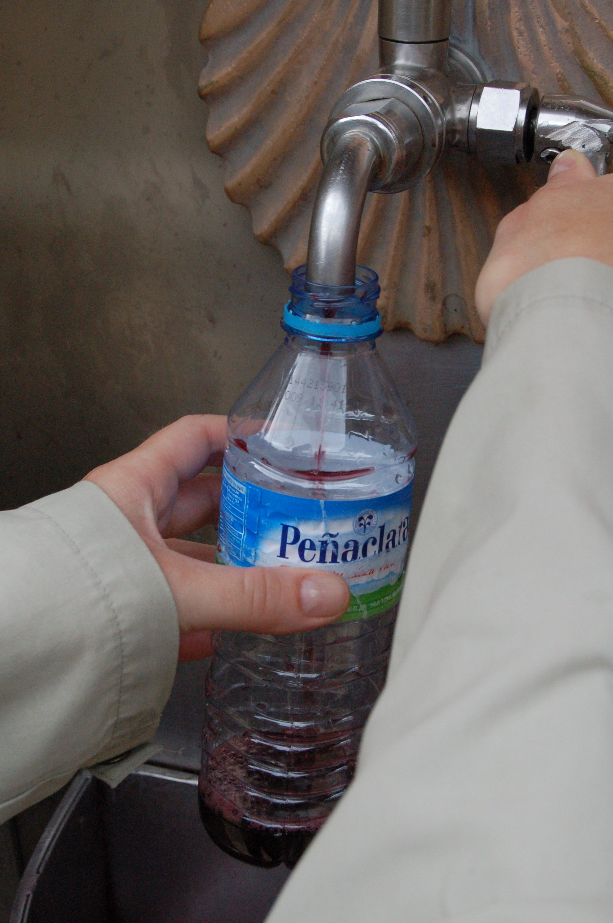 Ardoaren Iturria Iratxeko monasterioan.